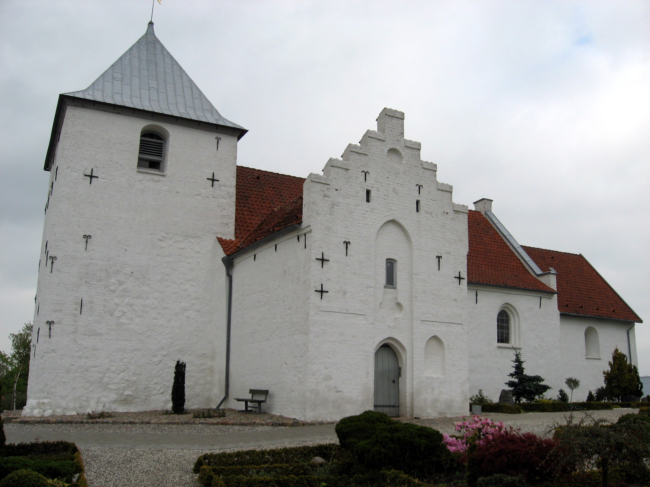 Kolt Kirke in Kolt Sogn, Århus Kommune, Denmark.